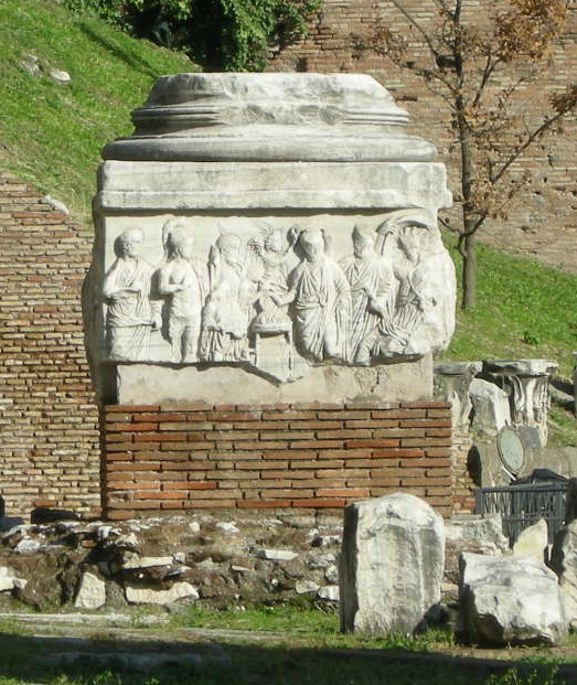 Base dei decennalia 04